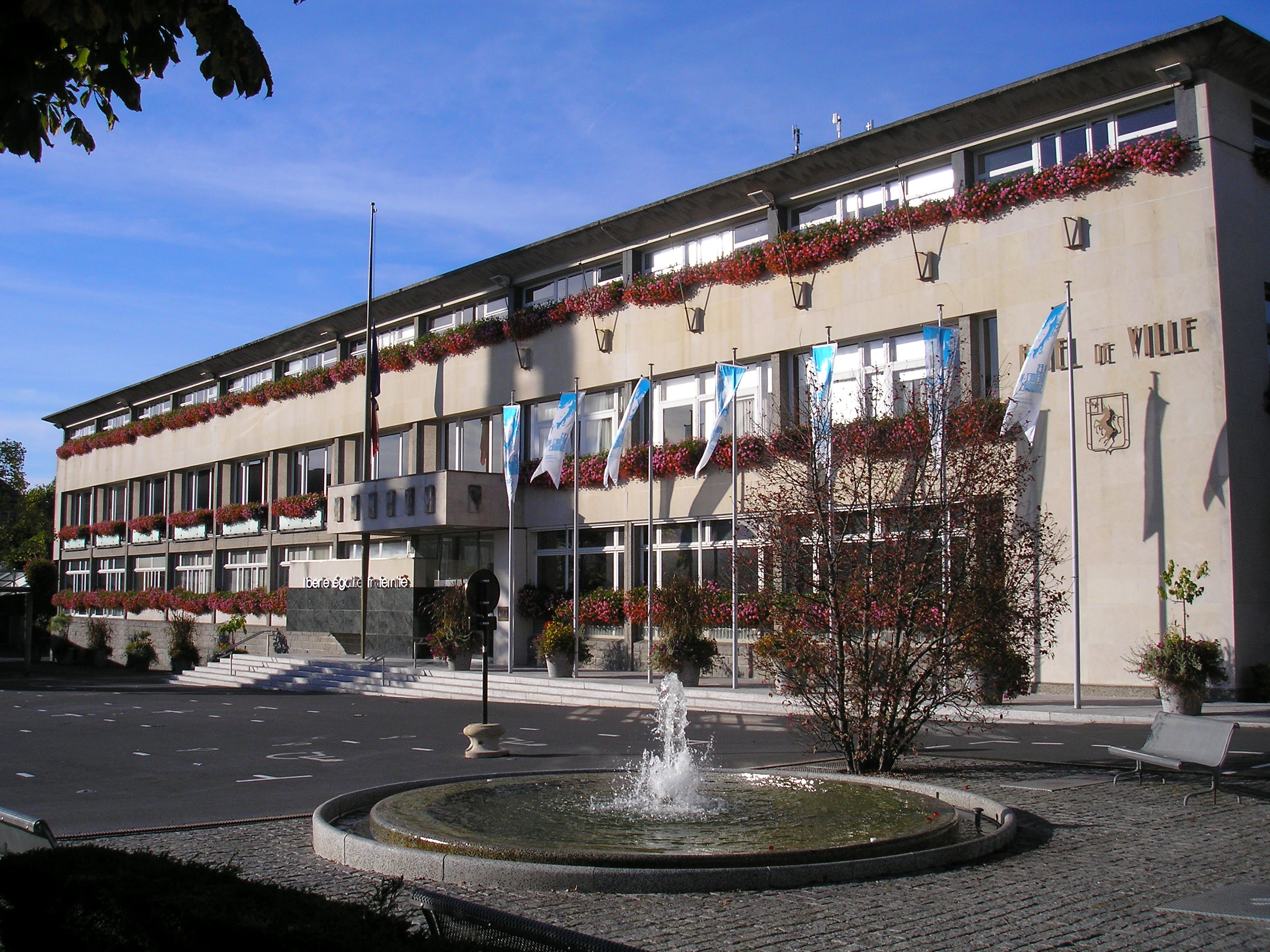 Saint-Lô (Normandie, France). L'hôtel de ville.